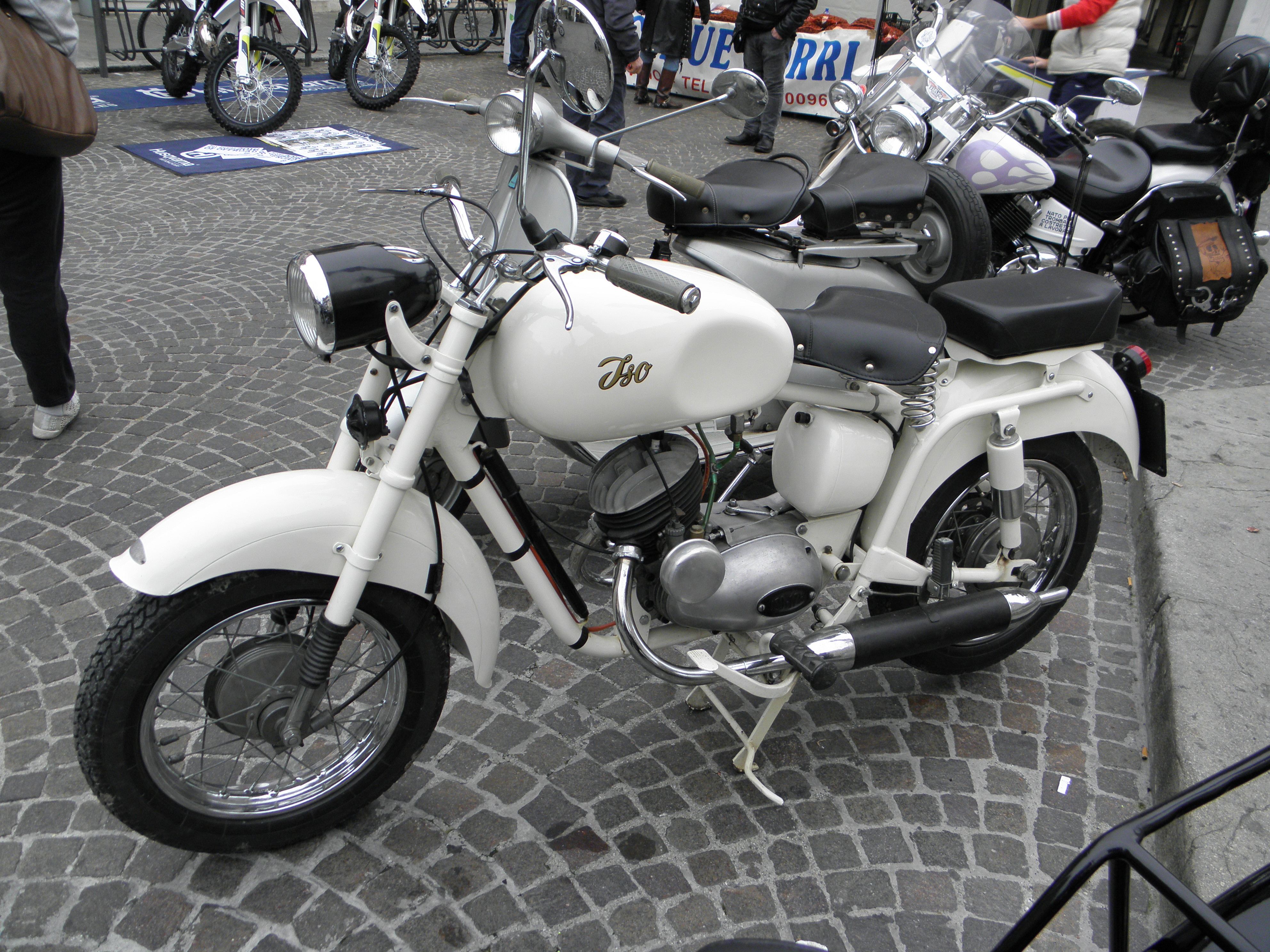 Rovigo, Piazza Vittorio Emanuele II, motocicletta Iso in mostra statica.